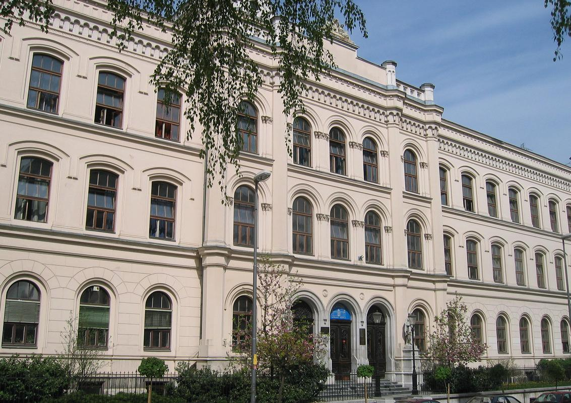 Realka (high school), Ljubljana photo:Ziga 13:01, 7 May 2006 (UTC)